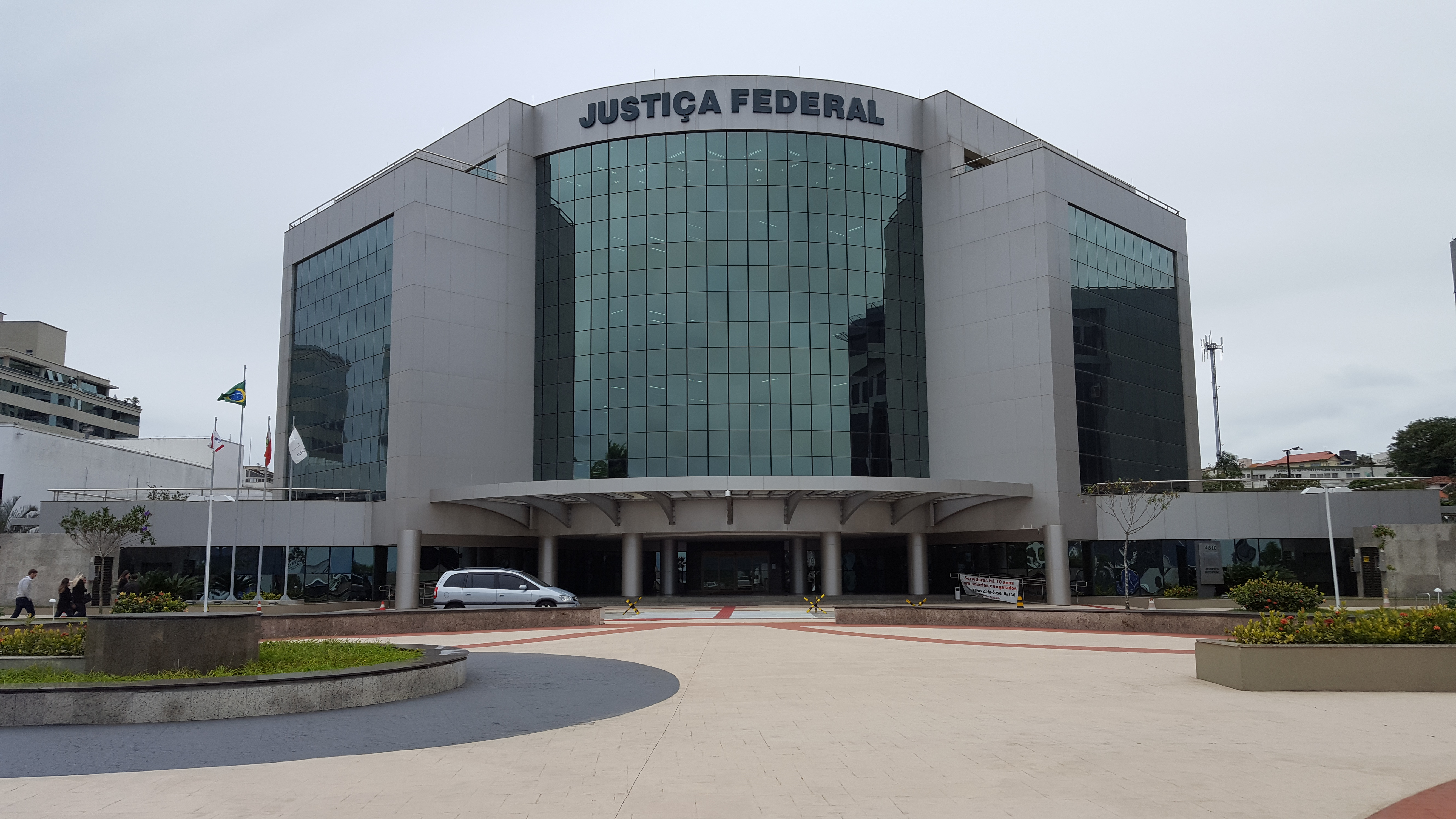 Prédio da Justiça Federal de Santa Catarina, em Florianópolis.